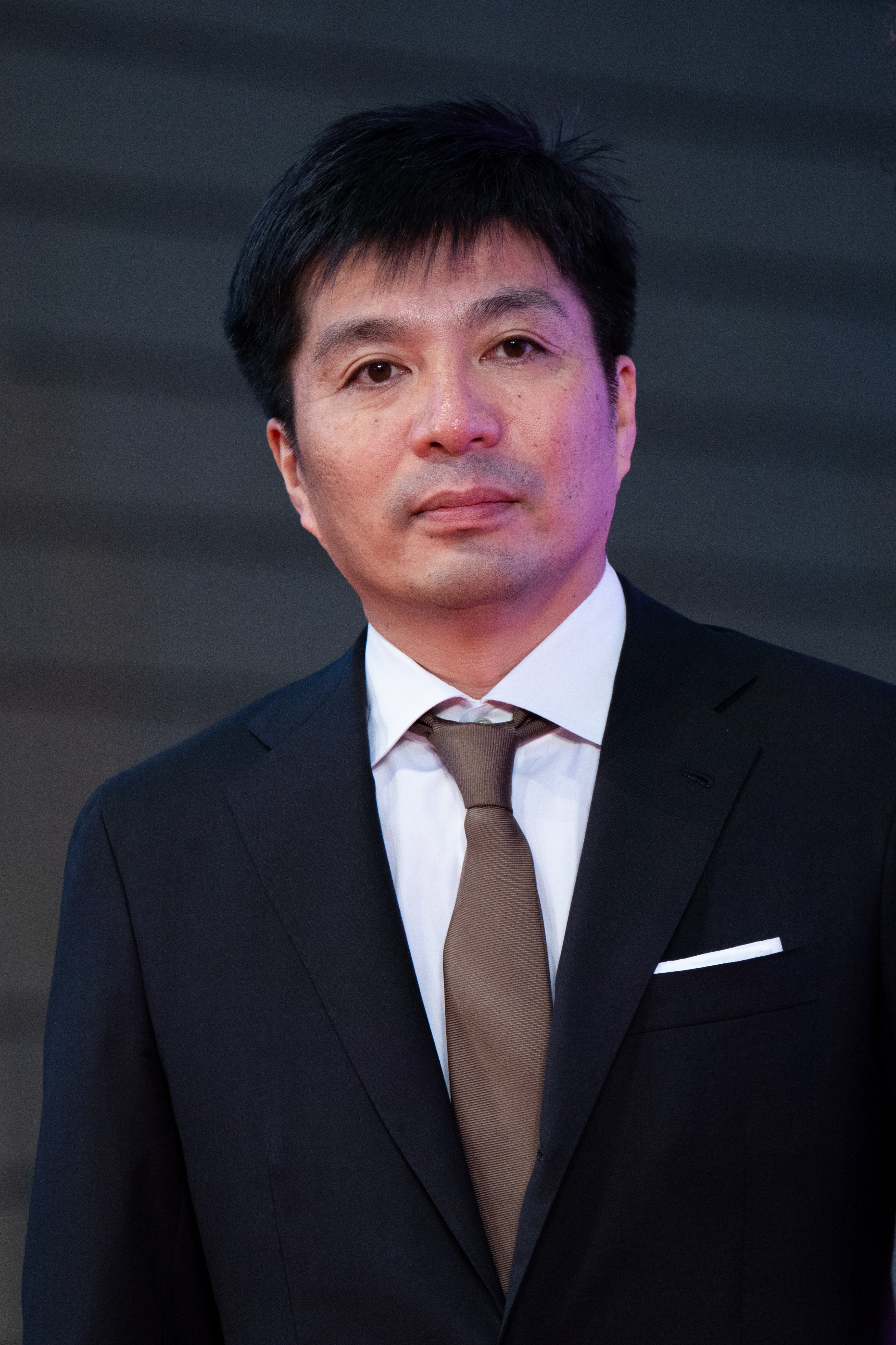 第32回 東京国際映画祭 オープニングセレモニー 藤田晋 (花と雨)